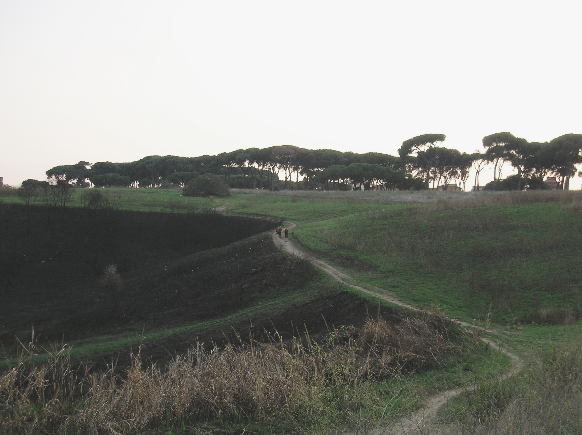 Parco regionale urbano del Pineto, segni dell'incendio dell'estate del 2009. Sullo sfondo la Pineta Sacchetti